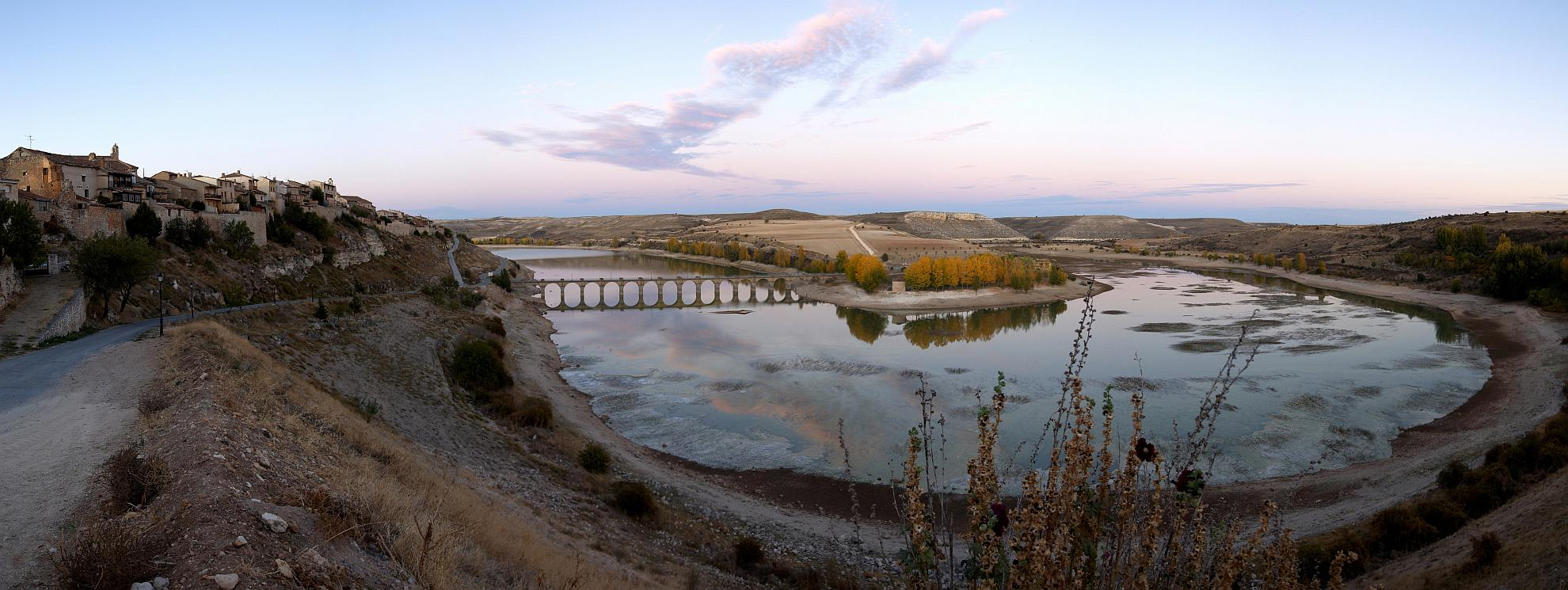 Panorámica al atardecer del embalse de Linares junto al pueblo segoviano de Maderuelo.